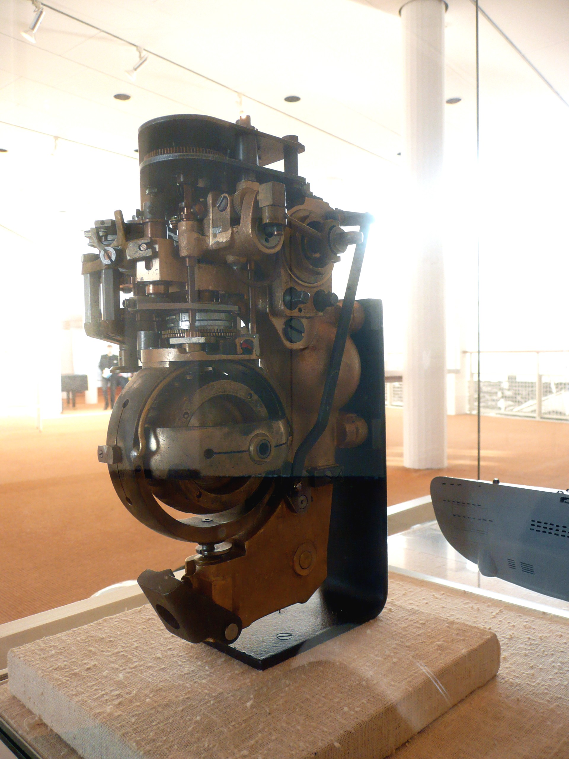 Steuereinheit eines deutschen Flächenabsuchtorpedos (FAT). Ausgestellt im Deutschen Schiffahrtsmuseum Bremerhaven.